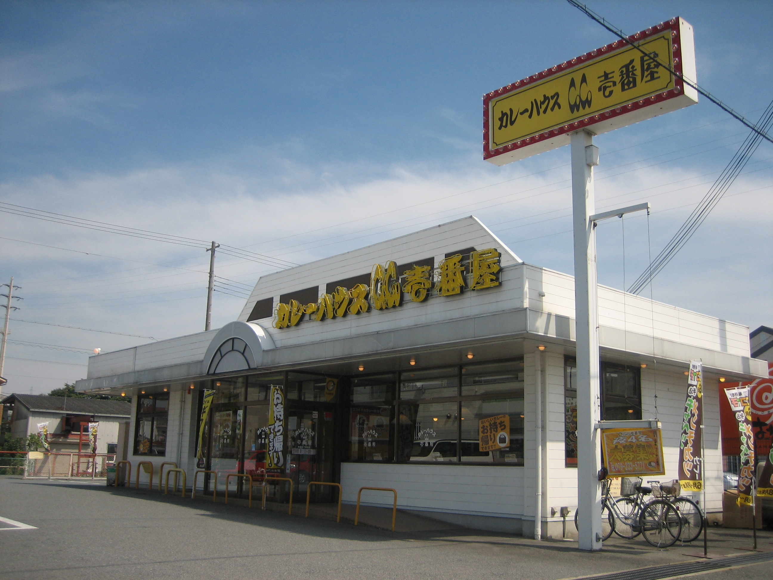 CoCo壱番屋飾磨区下野田店。